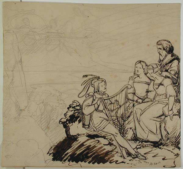 Mittelalterlicher Sänger